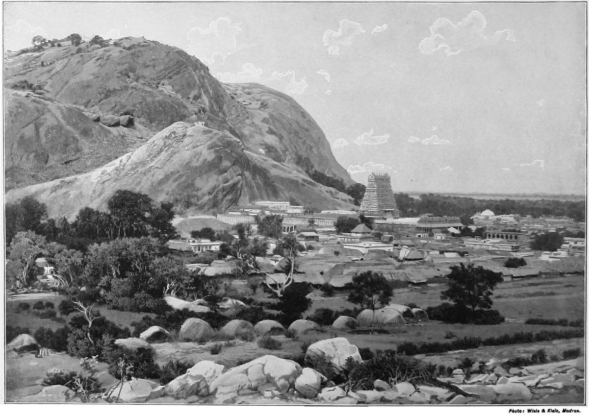 Teruparankundram near Madurai